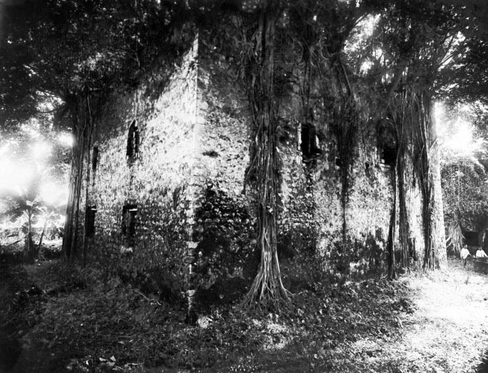 Repronegatief. Ruïne van het blokhuis Amsterdam te Hila, Ambon, jarenlang het woonhuis van Rumphius